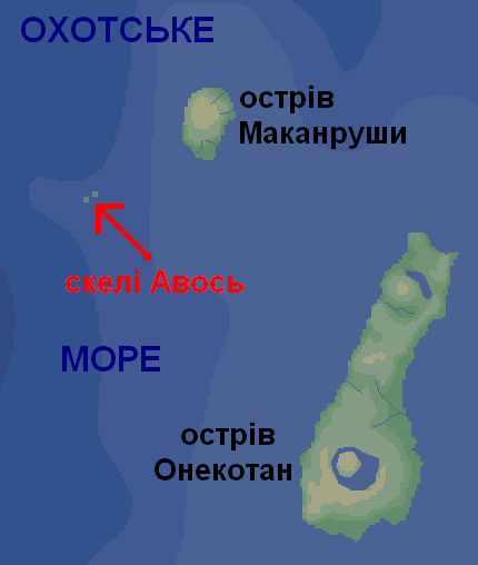 Мапа скель Авось